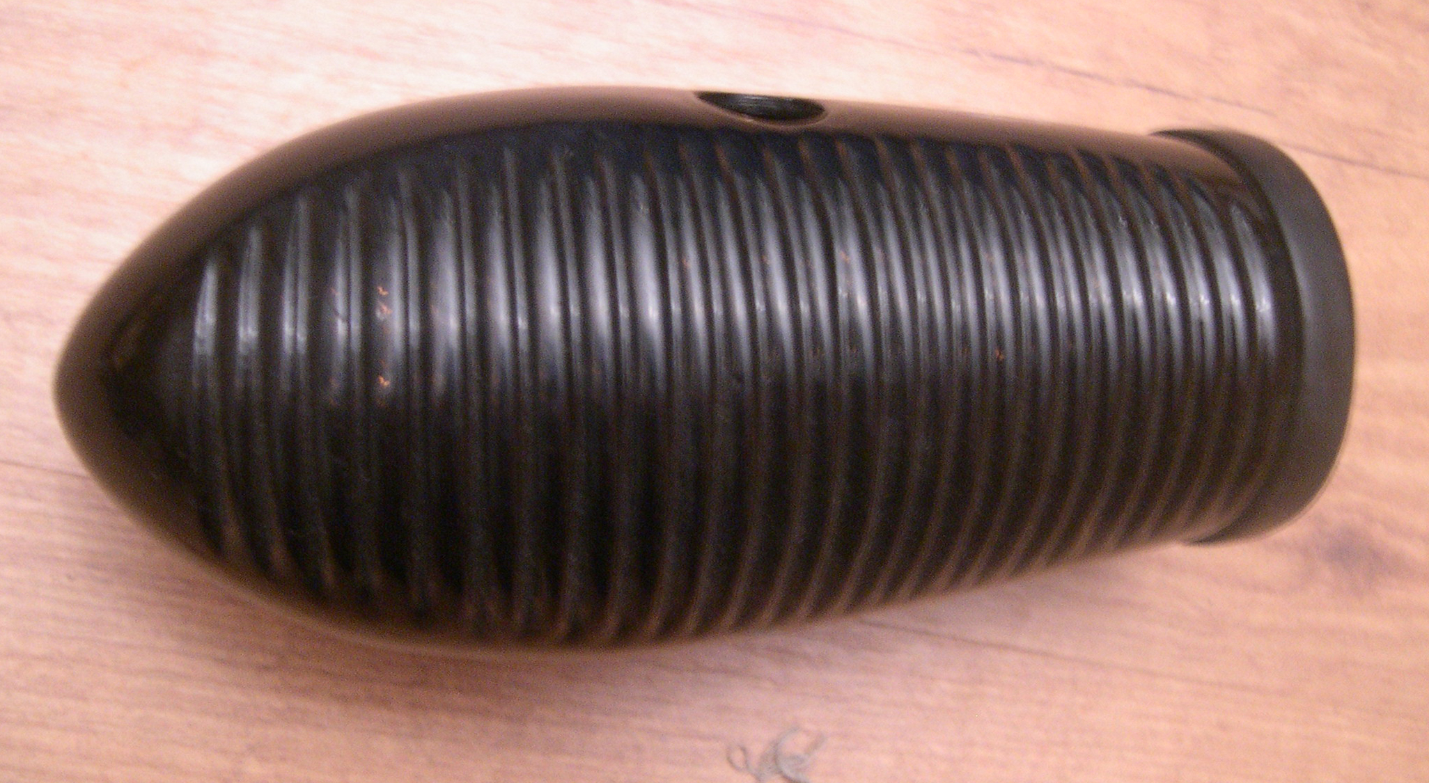 Guiro, instrumento musical de percusión